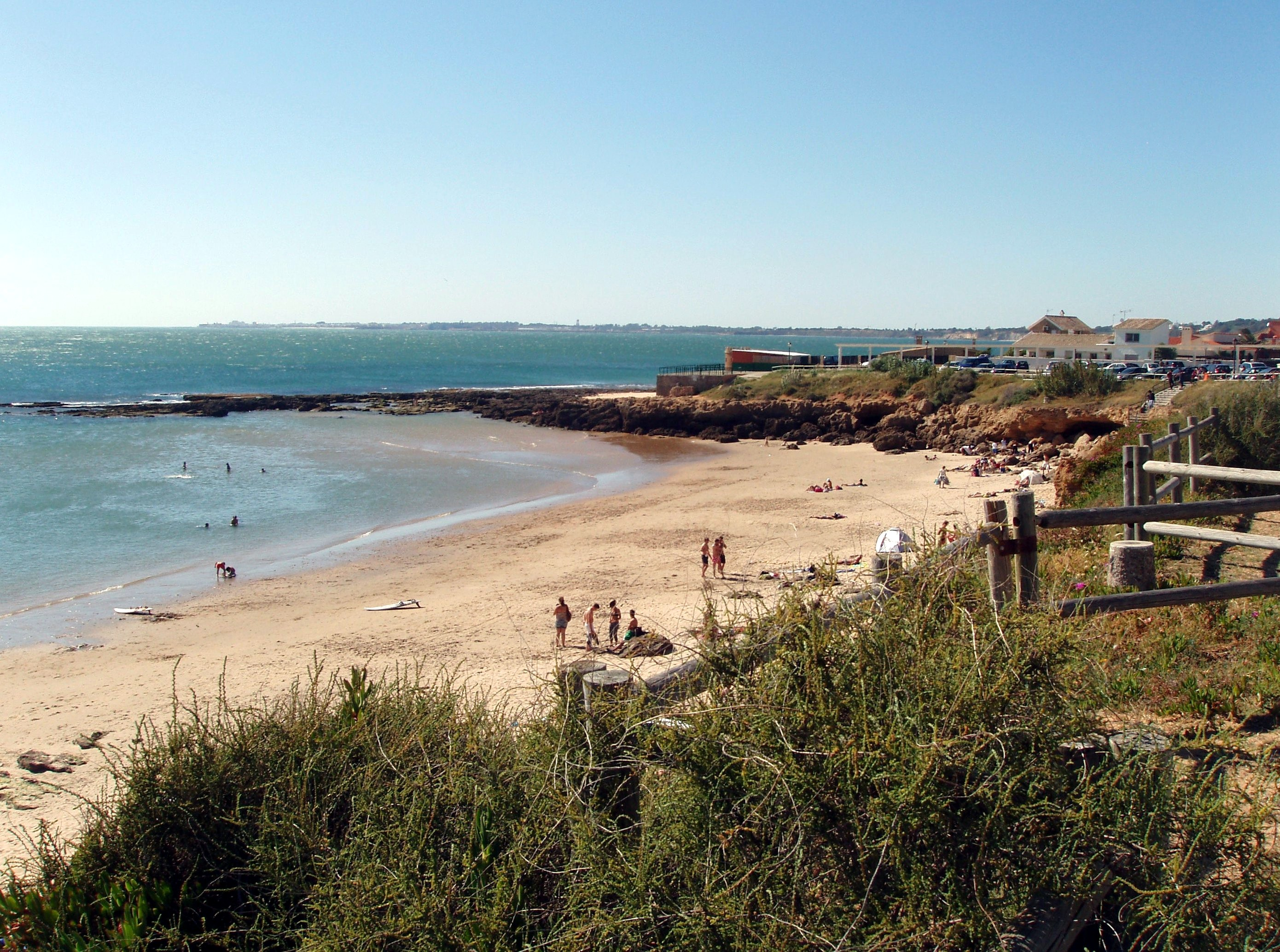 Playa de la Calita